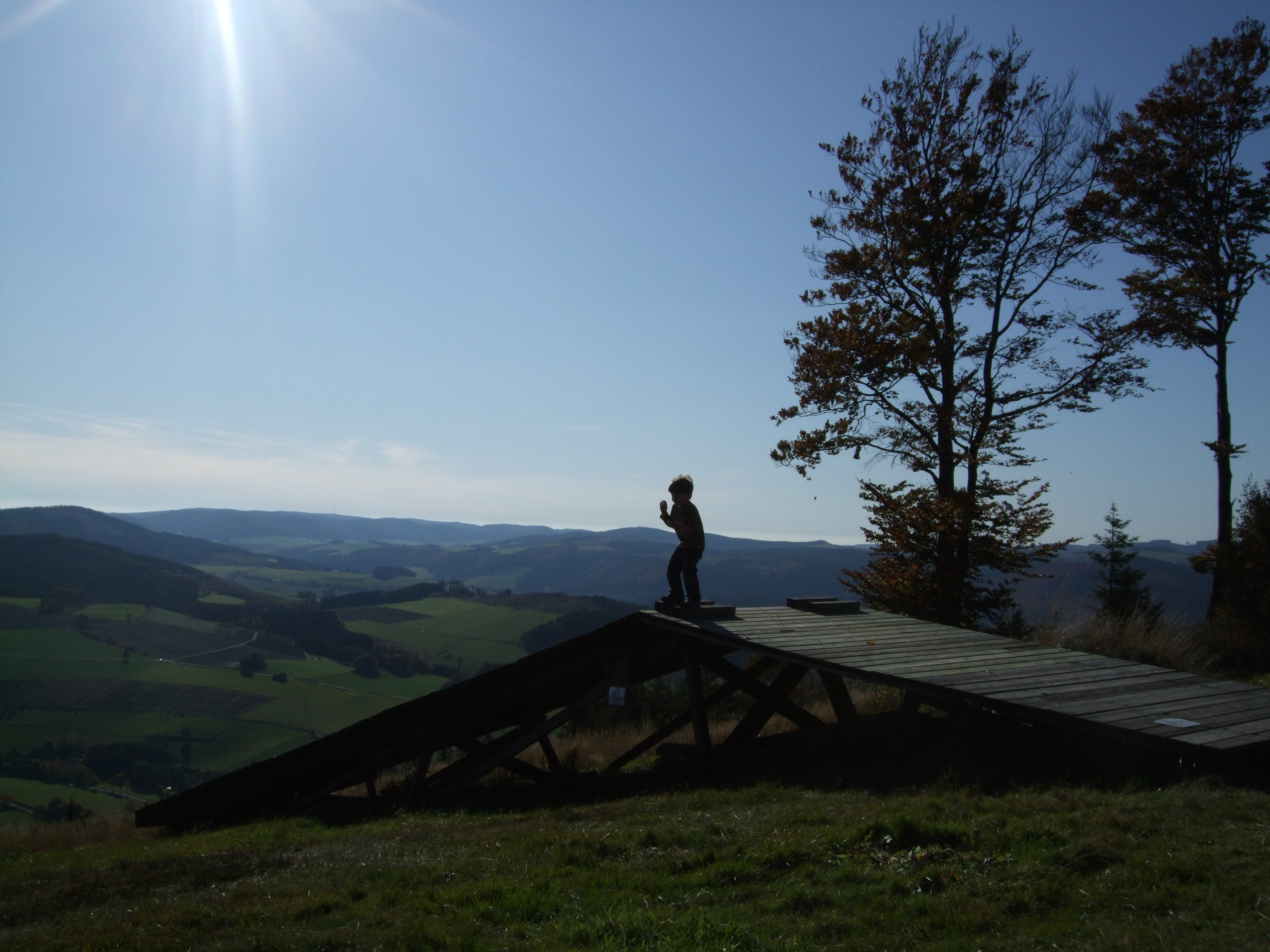 Startrampe für Flugdrachen am Istenberg, Bruchhausen, nahe Winterberg, Sauerland